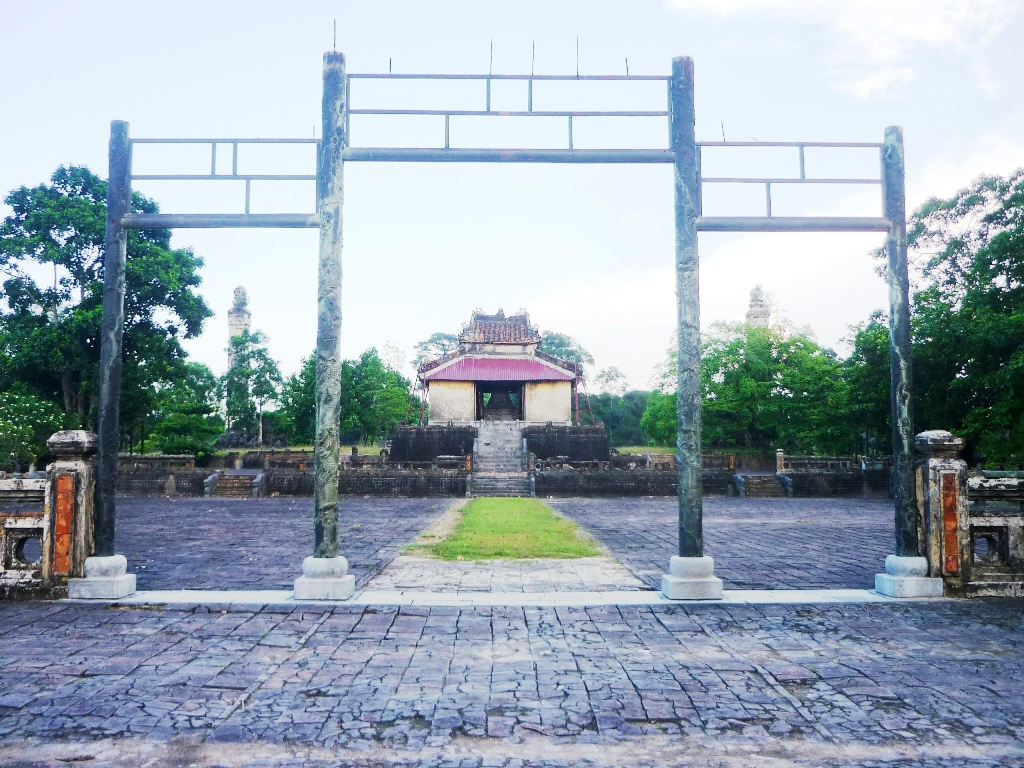 Thể loại:Nhà Nguyễn Thể Loại:Di tích cố đô Huế Thể loại:Lăng tẩm các Vua chúa Nguyễn Thể loại:Di tích ngoài Kinh Thành Huế